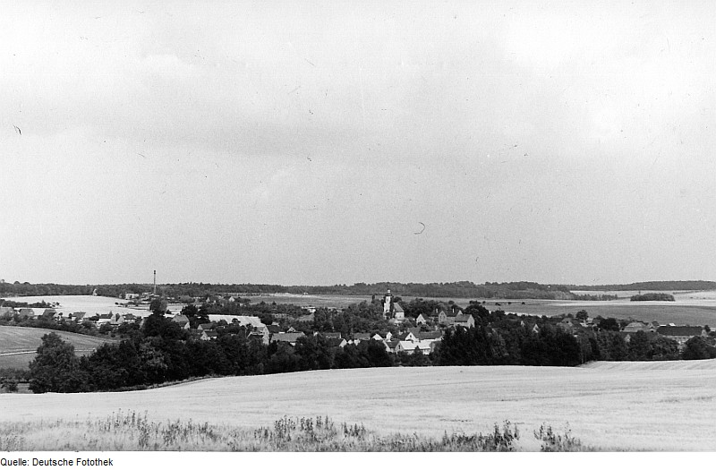 Original image description from the Deutsche Fotothek Wermsdorf-Mahlis. Blick vom Windmühlenberg